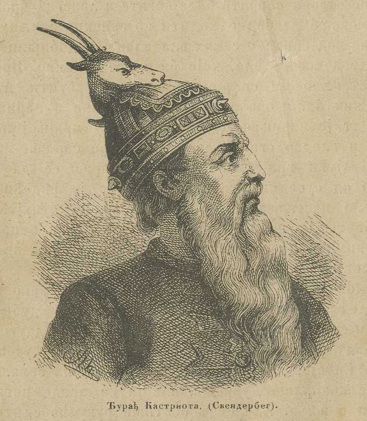 Đurađ Kastriota (Skenderbeg)